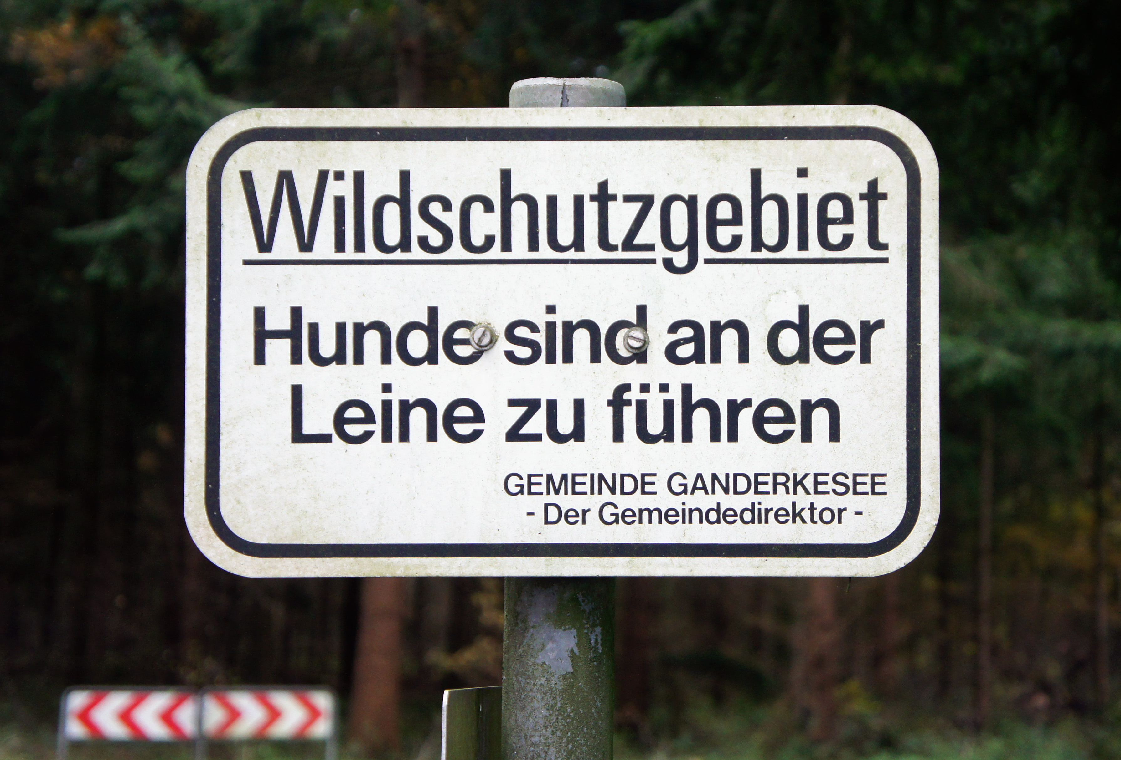 Schild Wildschutzgebiet in Ganderkesee, Niedersachsen